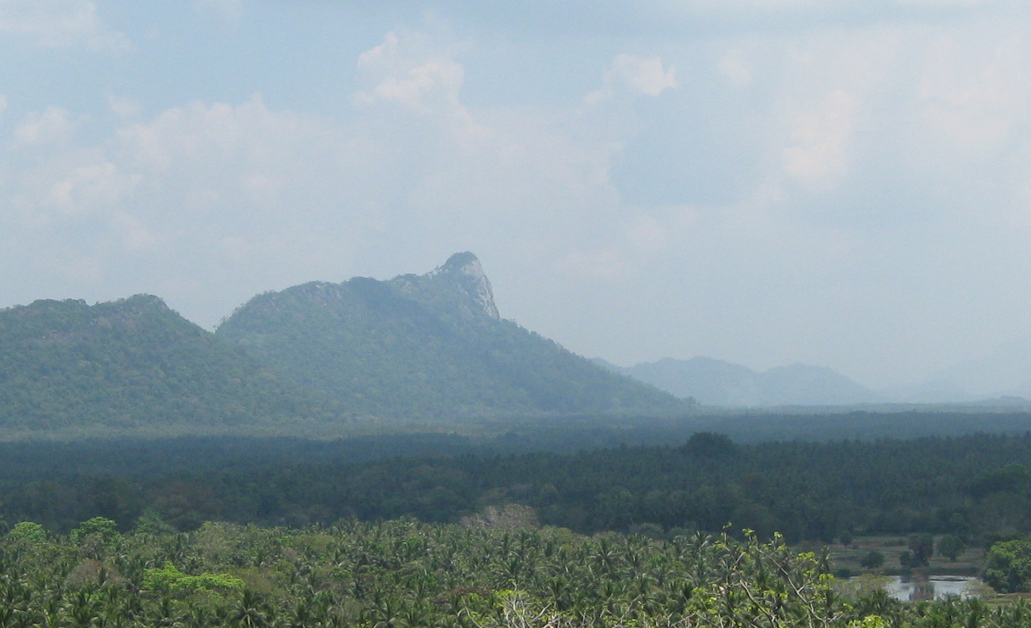 සිංහල: ශ්‍රී ලංකාවේ කුරුණෑගල දිස්ත්‍රිකයේ පිහිටි ශේෂ කන්දකි.